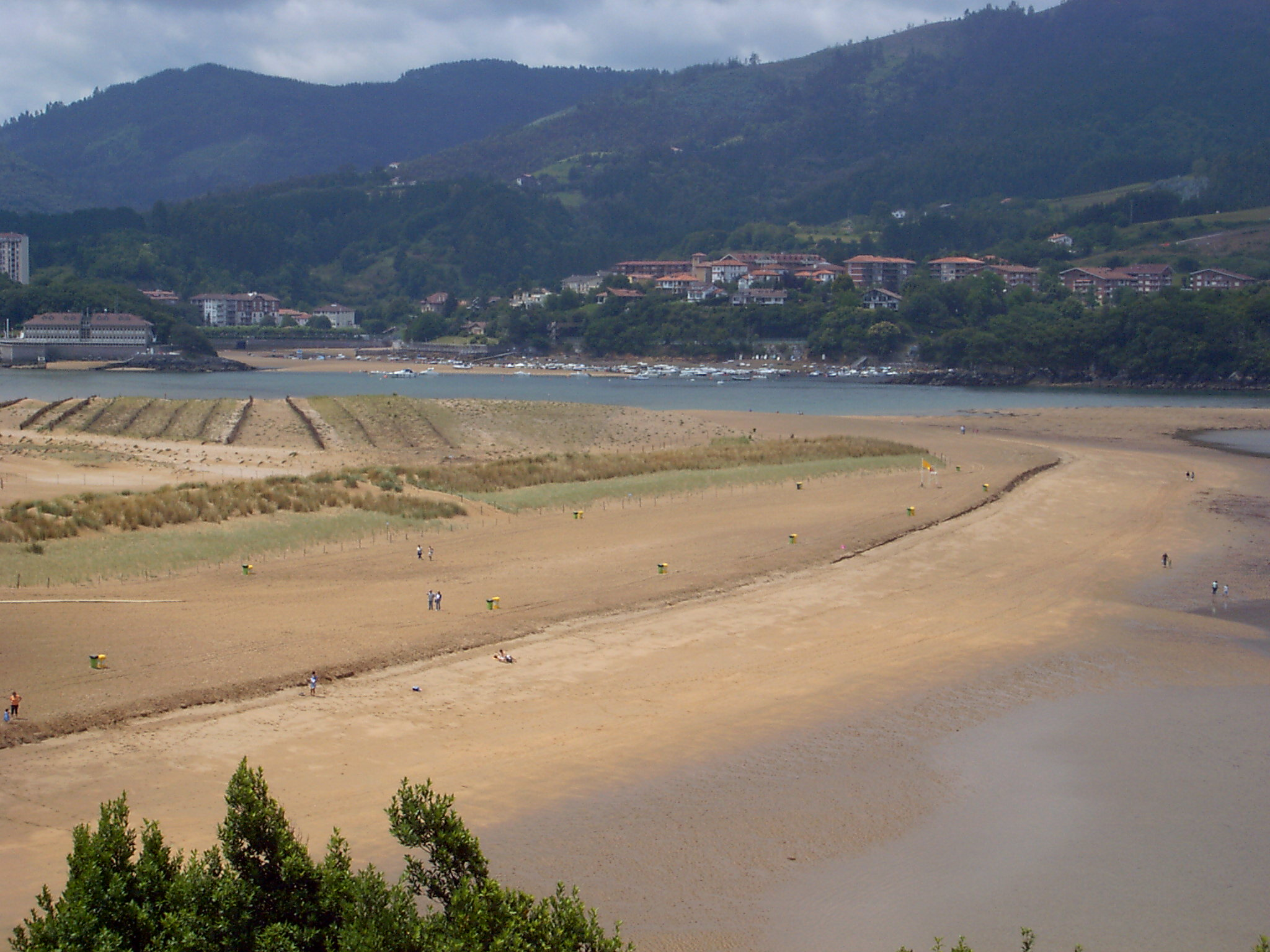 Urdaibai landscape and backgound Sukarrieta